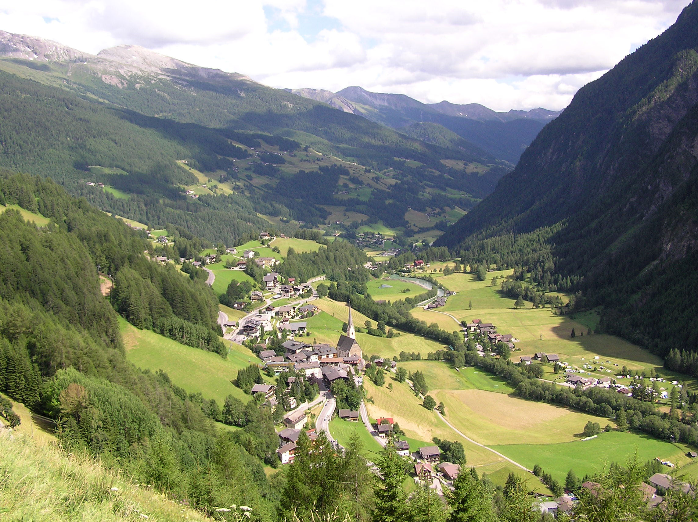 Heiligenblut von der Alten Glocknerstrasse